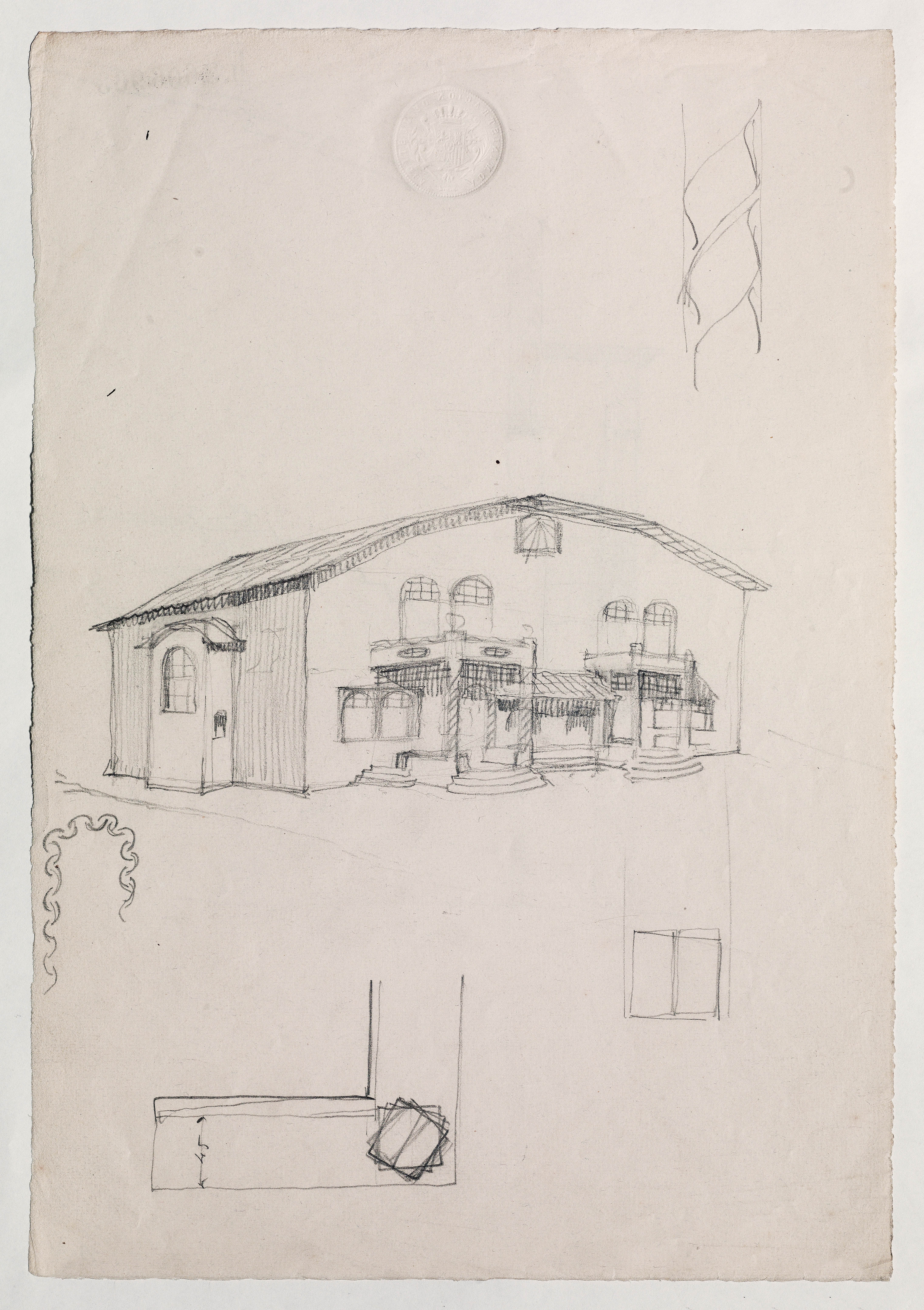 Casa aïllada amb jardí